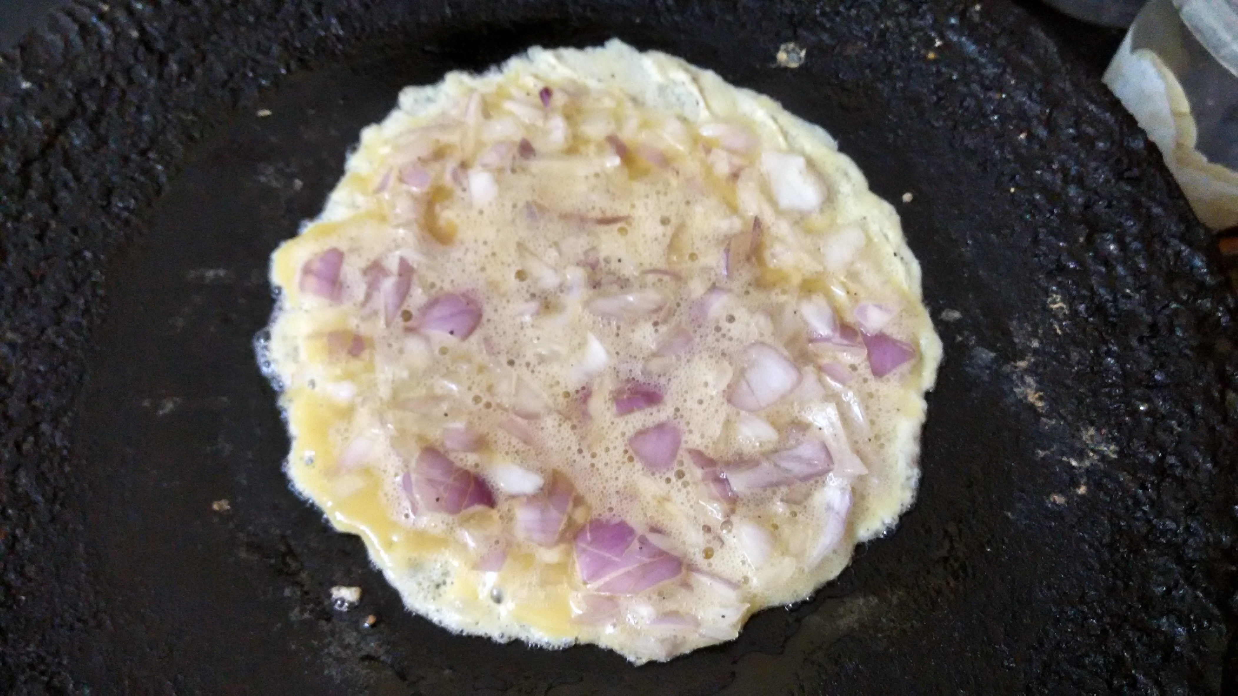 அரைவேக்காட்டு முட்டை